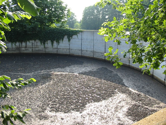 Offenes Güllesilo auf einem Hof in Kölkebeck bei Halle Westfalen